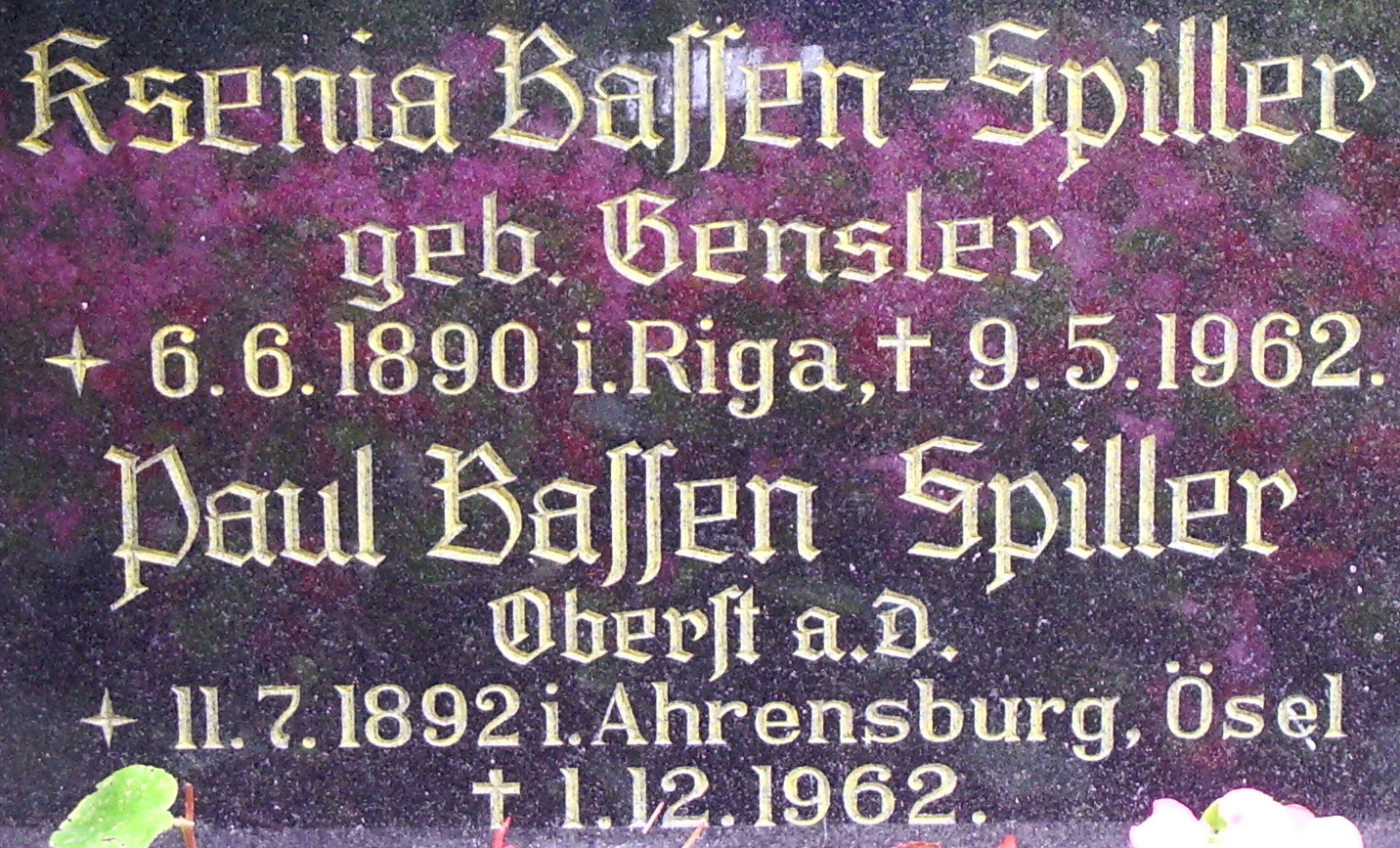 Grabstein von Oberst Paul Bassen-Spiller (*11. August 1892 in Kuressaare (deutsch Arensburg);† 9. Mai 1962 in Uetersen) und seiner Frau Kresia geb. Gensler (*16 Juni 1890 in Riga - † 19. Mai 1962 in Uetersen).